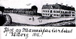 Viborg tugthus (1736-1877), 1816